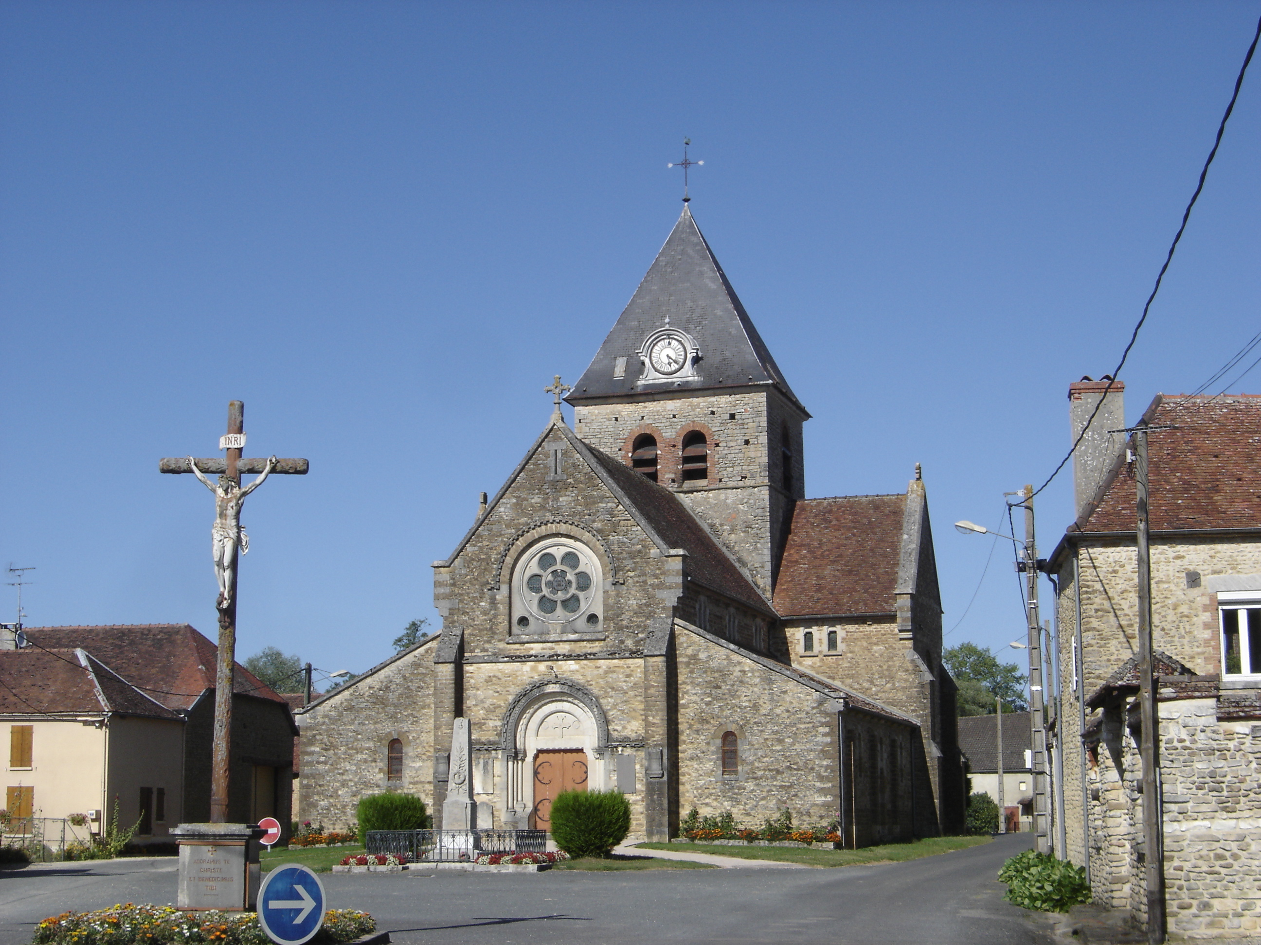 église Saint Laurent - Villy en Trodes - Aubde - France